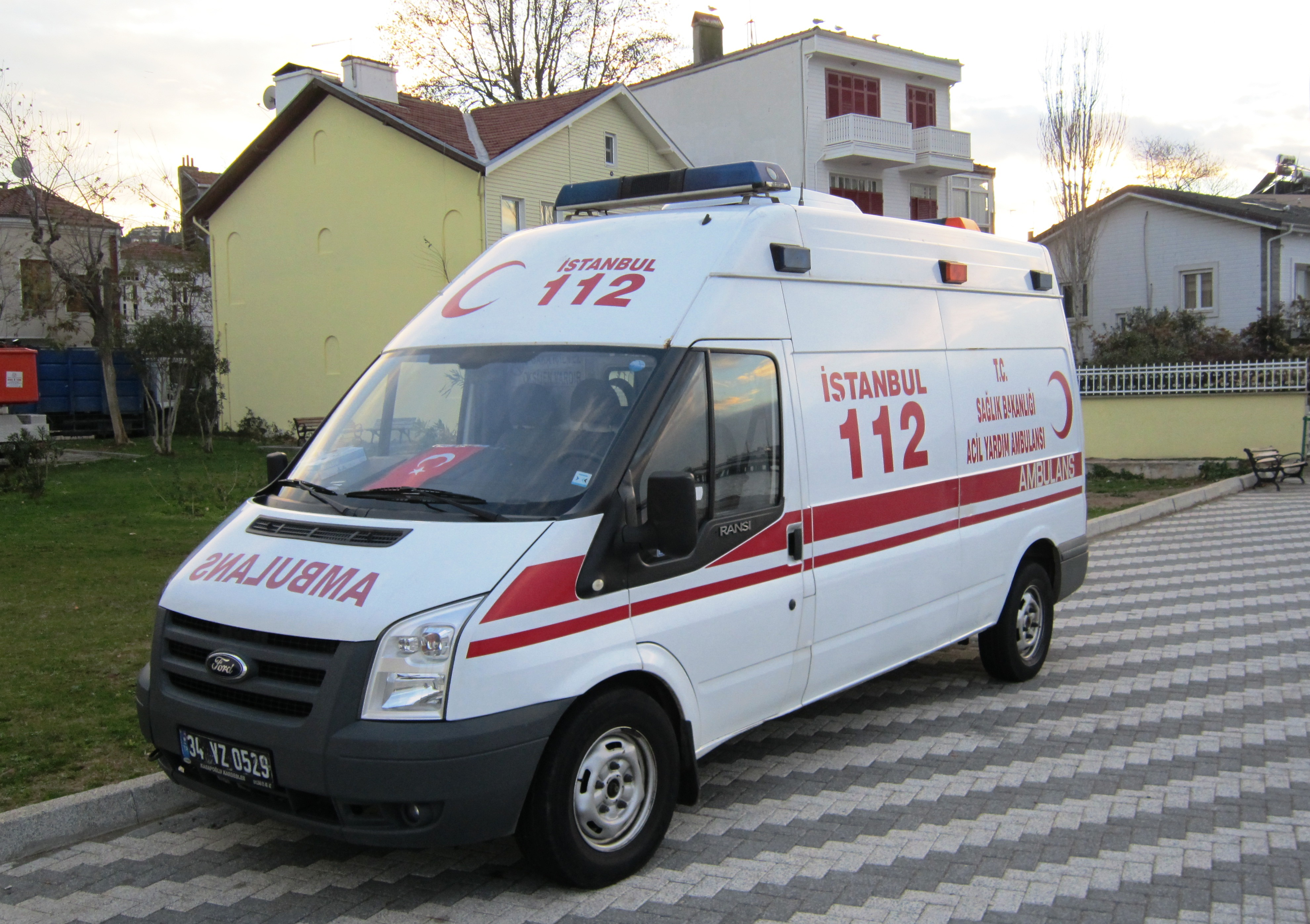 Turkse ambulance